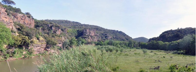 Lit majeur de l'Argens (83), à l'amont de la commune du Muy